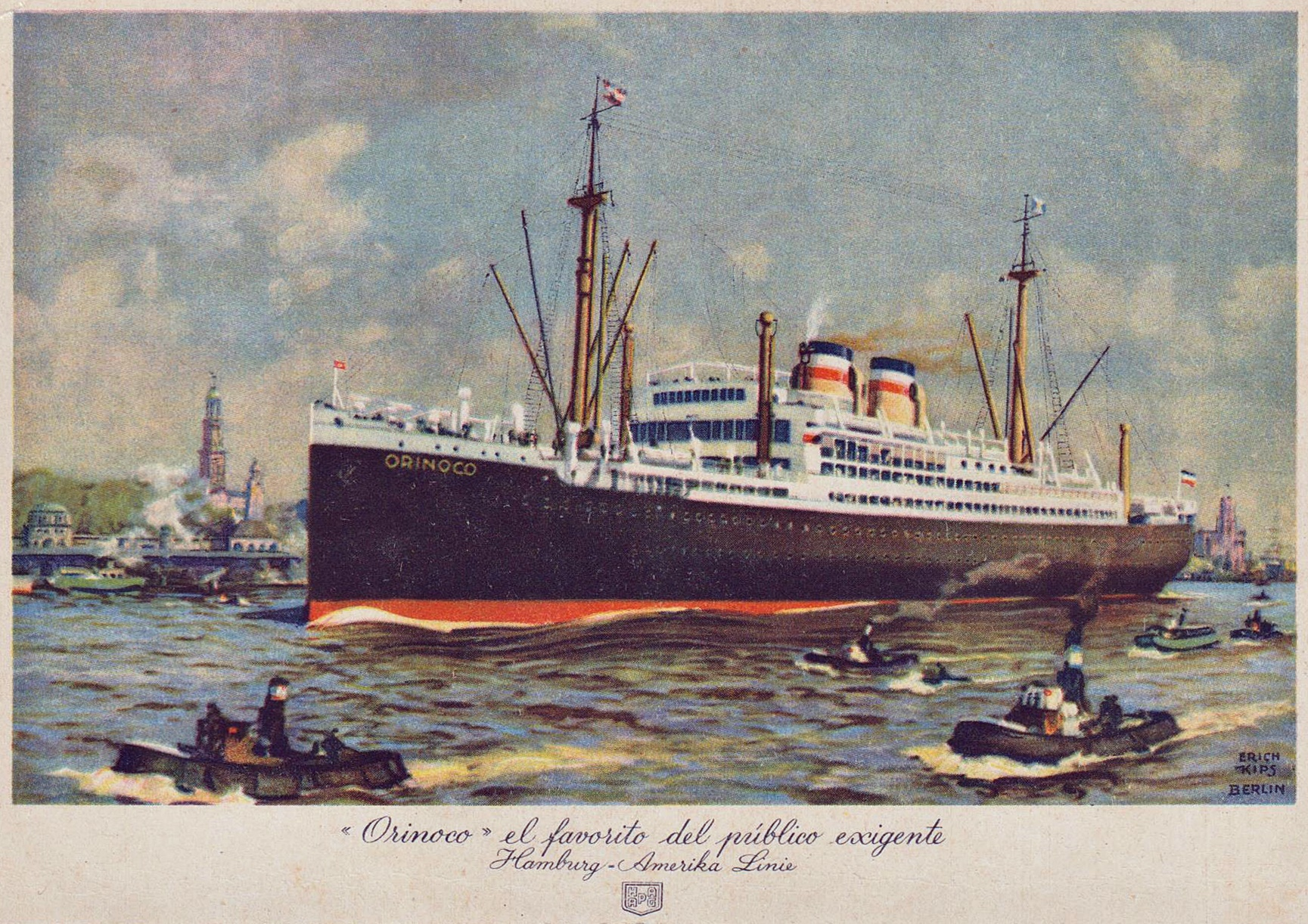 Motor-Passagierschiff Orinoco im Hamburger Hafen